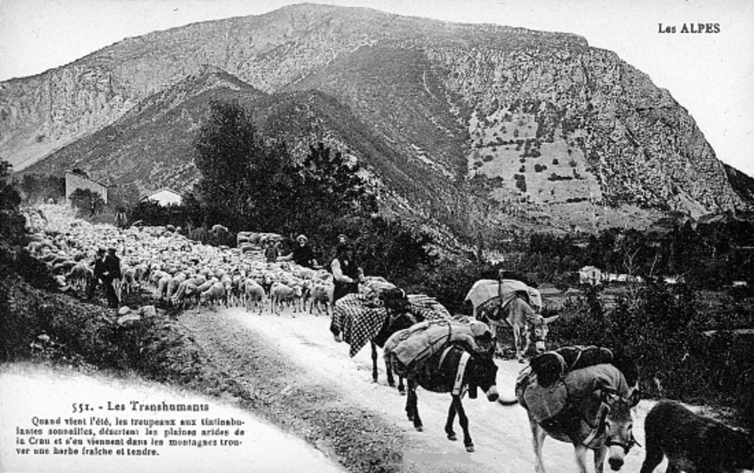 Transhumance de la basse Provence vers les Alpes provençales